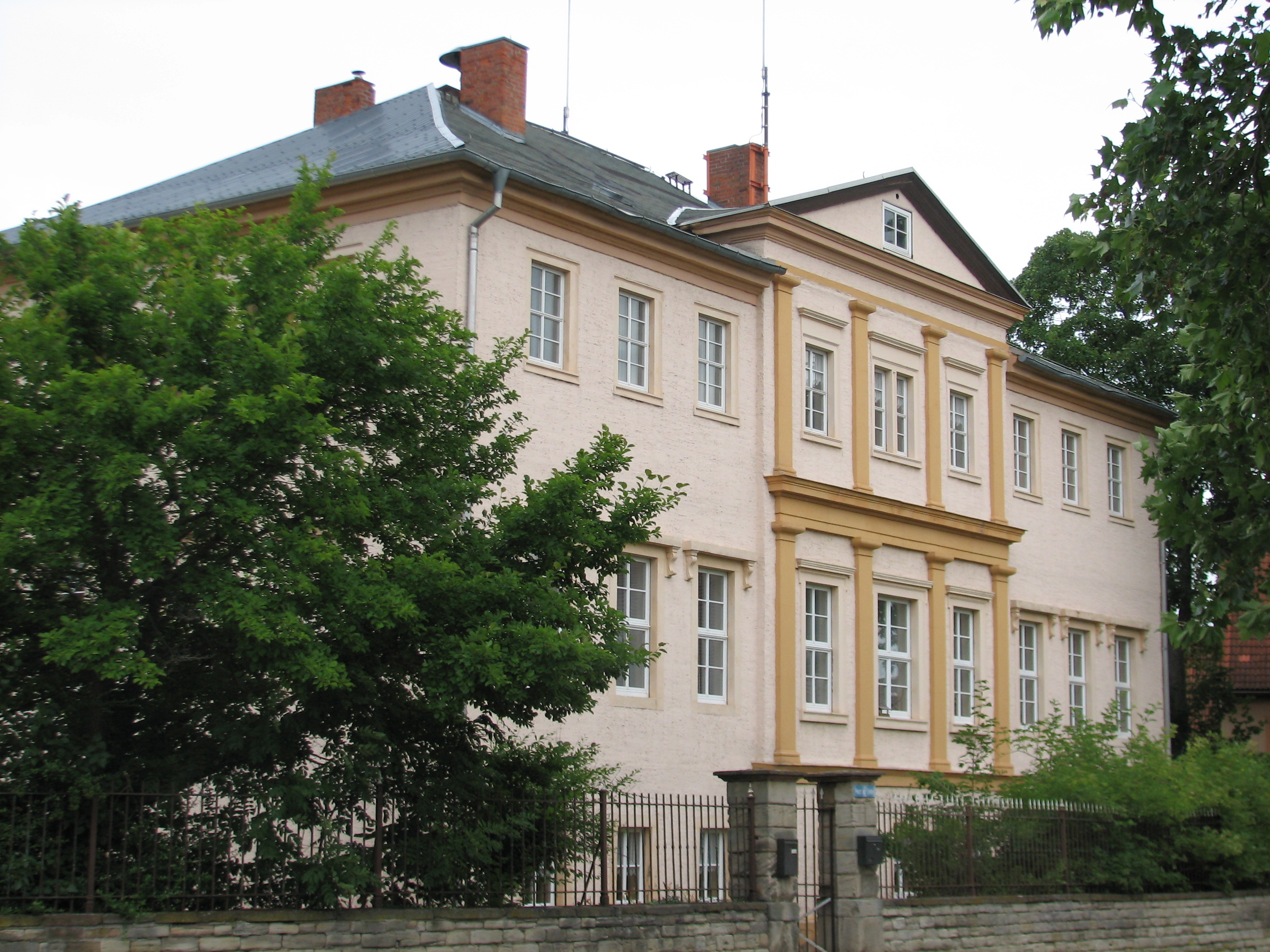 Das einstige Schloß von Wohlmirstedt in der Ortsmitte